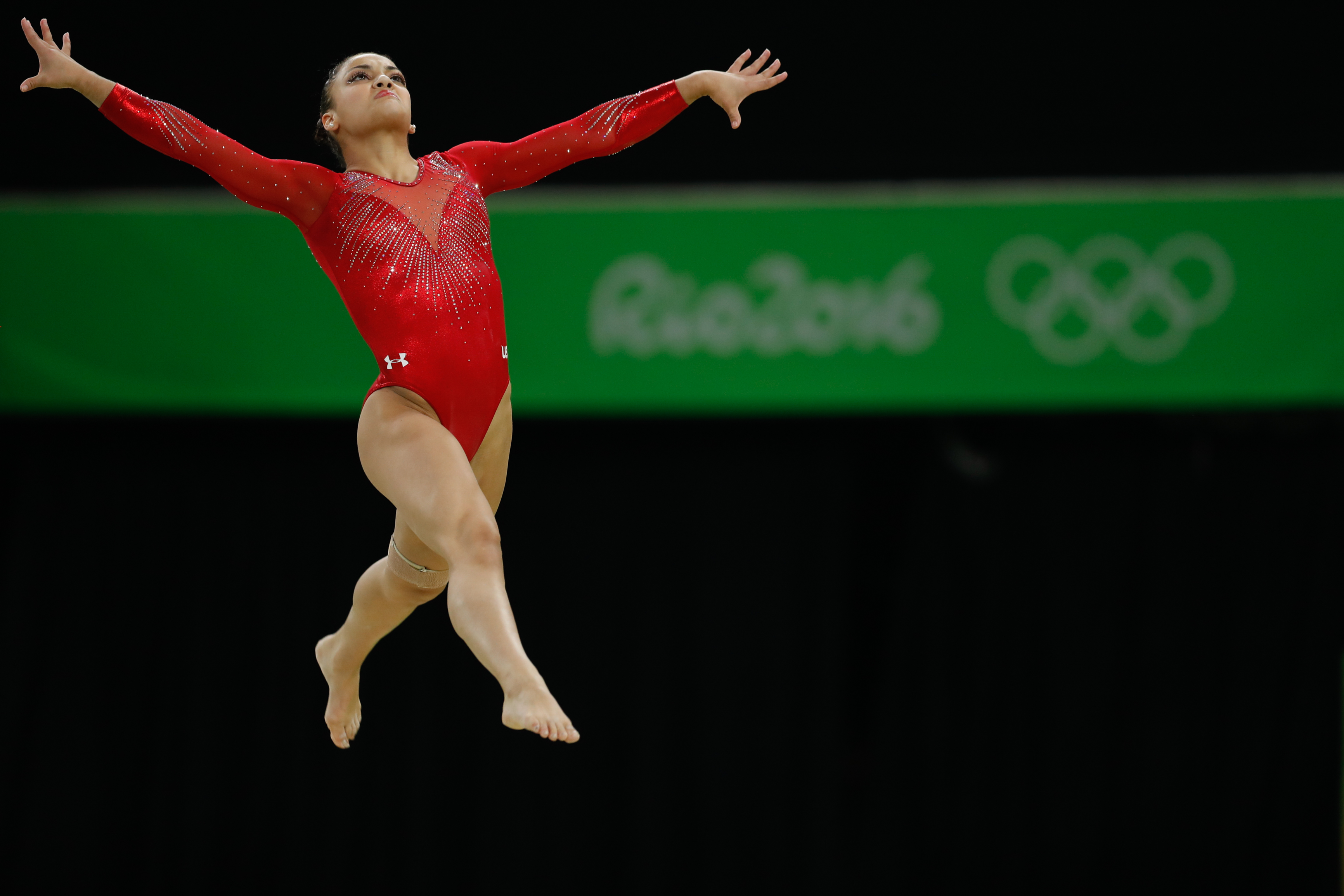 Rio de Janeiro - Ginasta Laurie Hernandez dos Estados Unidos termina com medalha de prata da trave (Fernando Frazão/Agência Brasil)